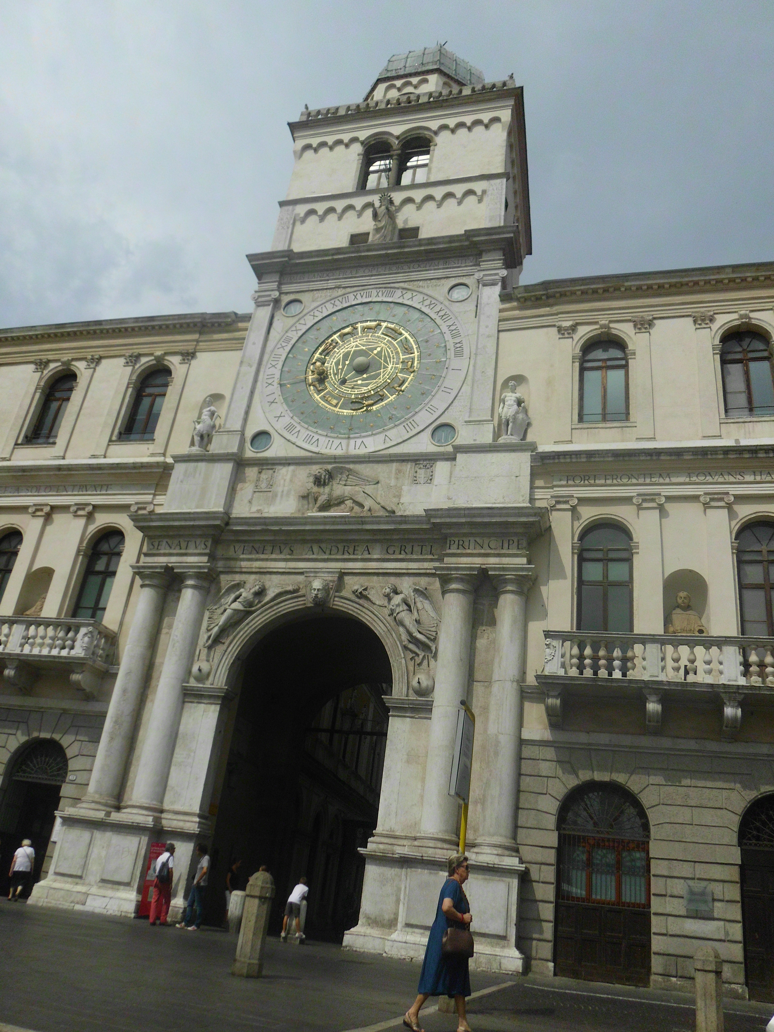 Padua, Italien: Torre dell’Orologio